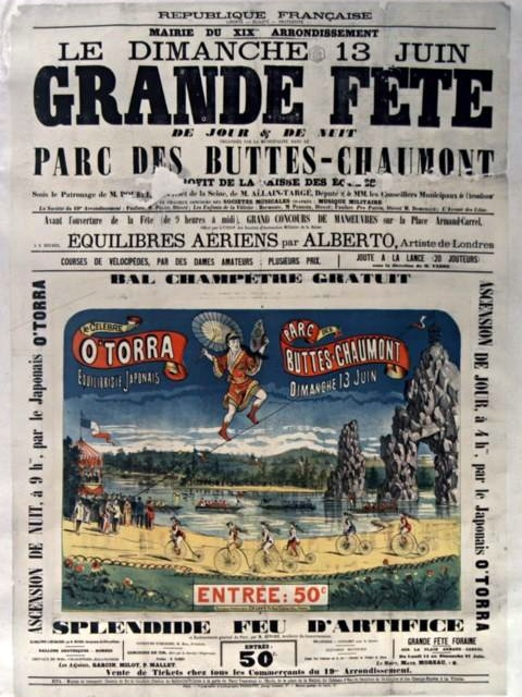 Affiche: Grande Fete. Parc des Buttes-Chaumont. 13. Juin 1890